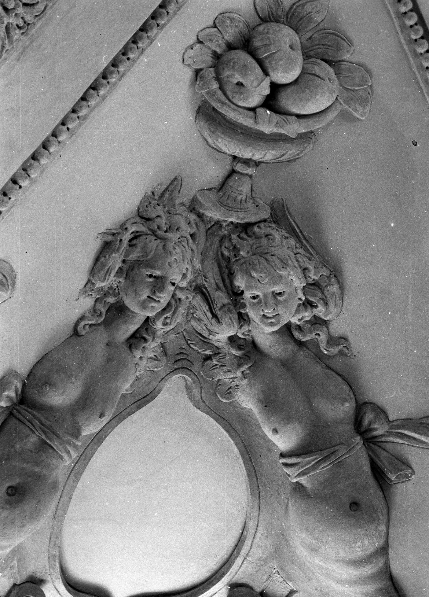 Schlosskapelle Kobersdorf - Manieristische Stukkatur